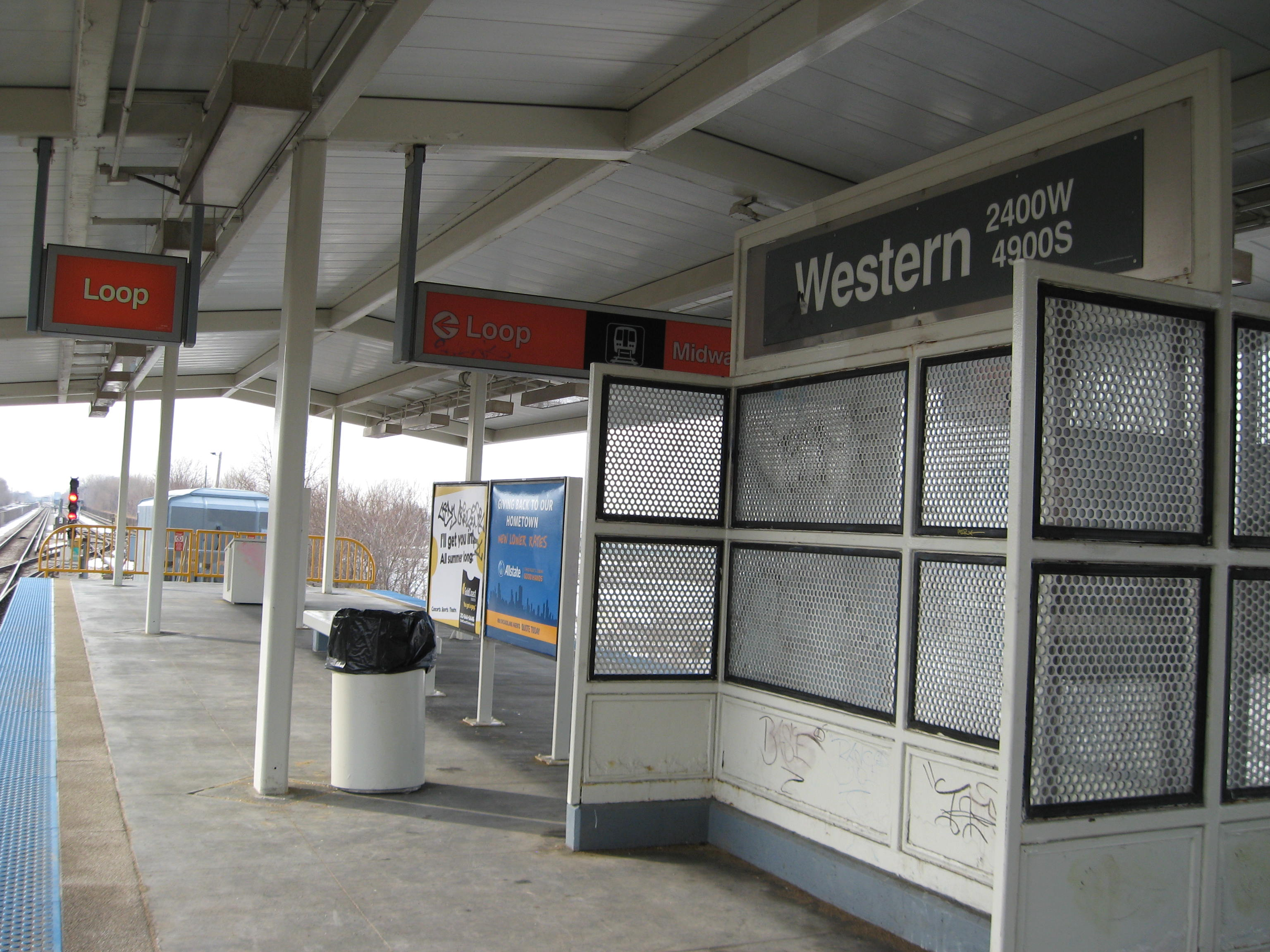 Western CTA Orange Line Station